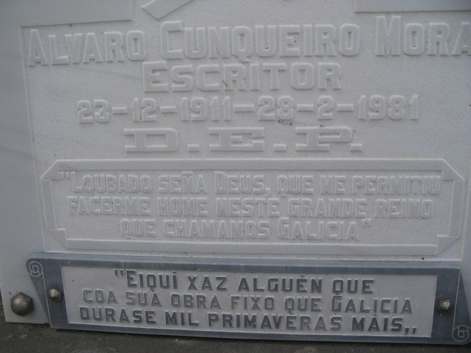 Tumba de Alvaro Cunqueiro en Mondoñedo